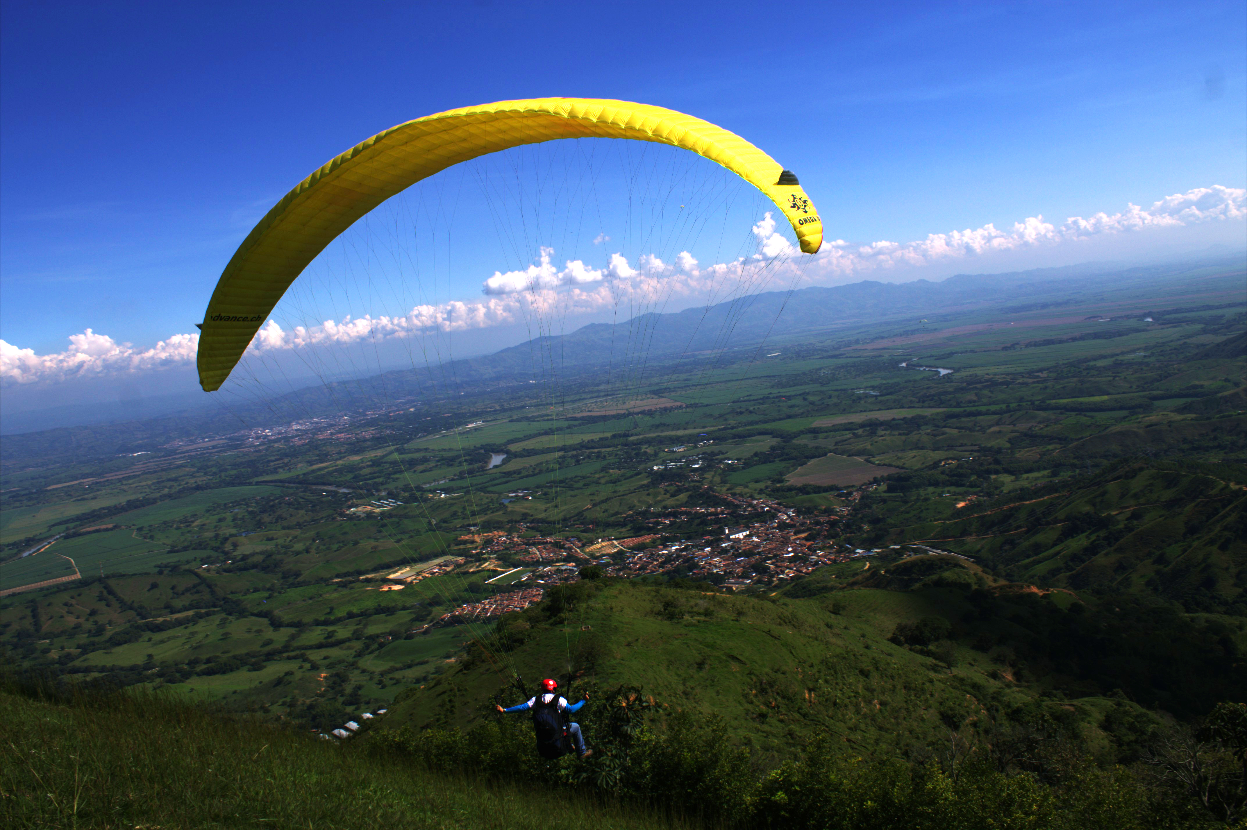 Esta fotografía fue tomada en el municipio colombiano con código 76041.